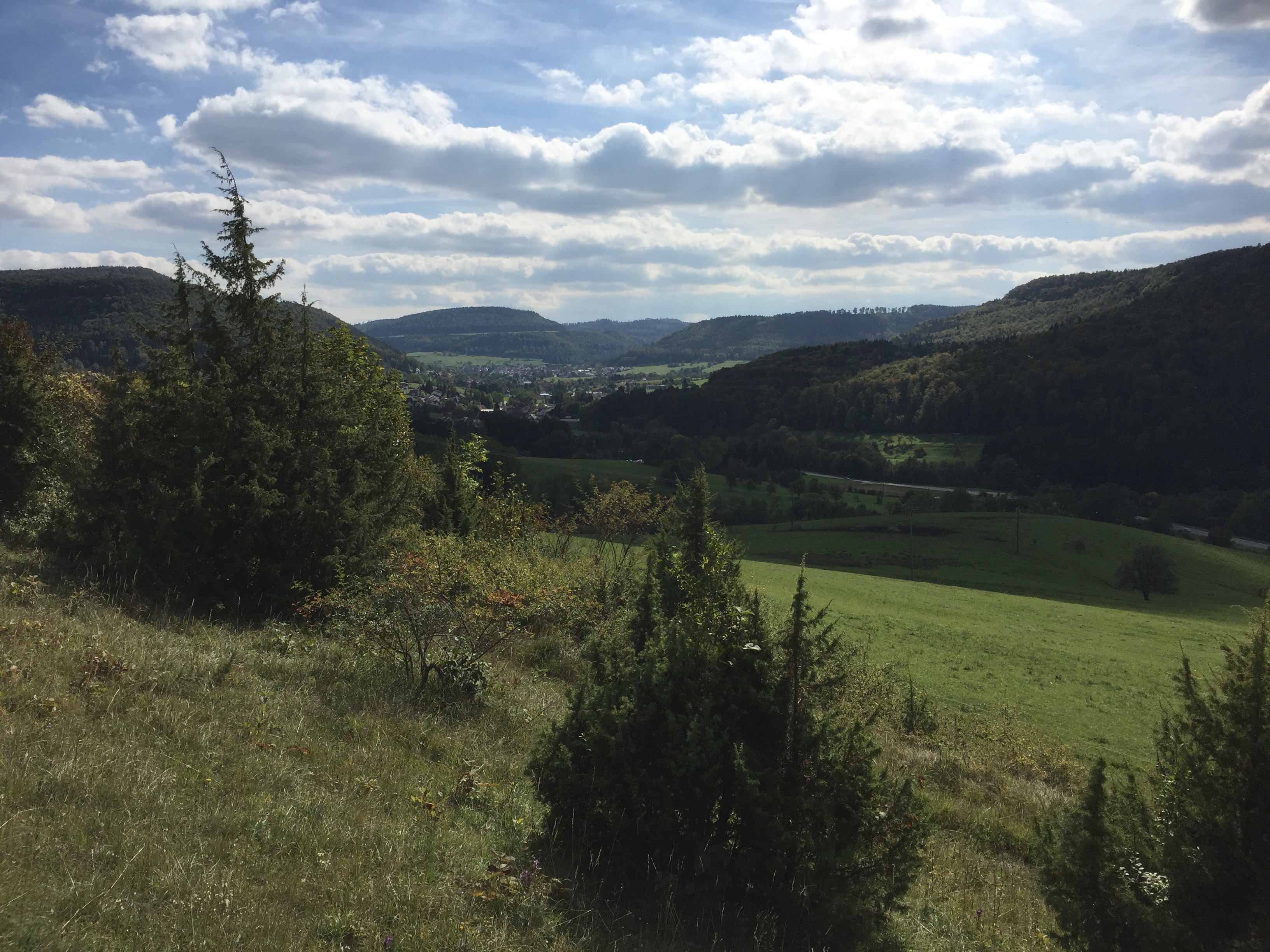 Naturschutzgebiet Bürgle bei Jungingen, Zollernalbkreis